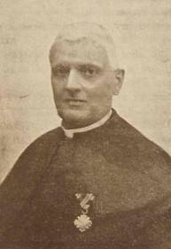 Tomáš Škrdle (1853 - 1913), Český katolický kněz-katecheta.